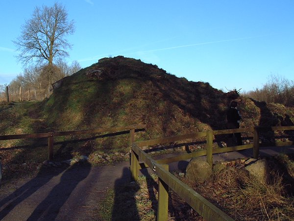 Blick auf den Querschnitt von Resten des Danewerks